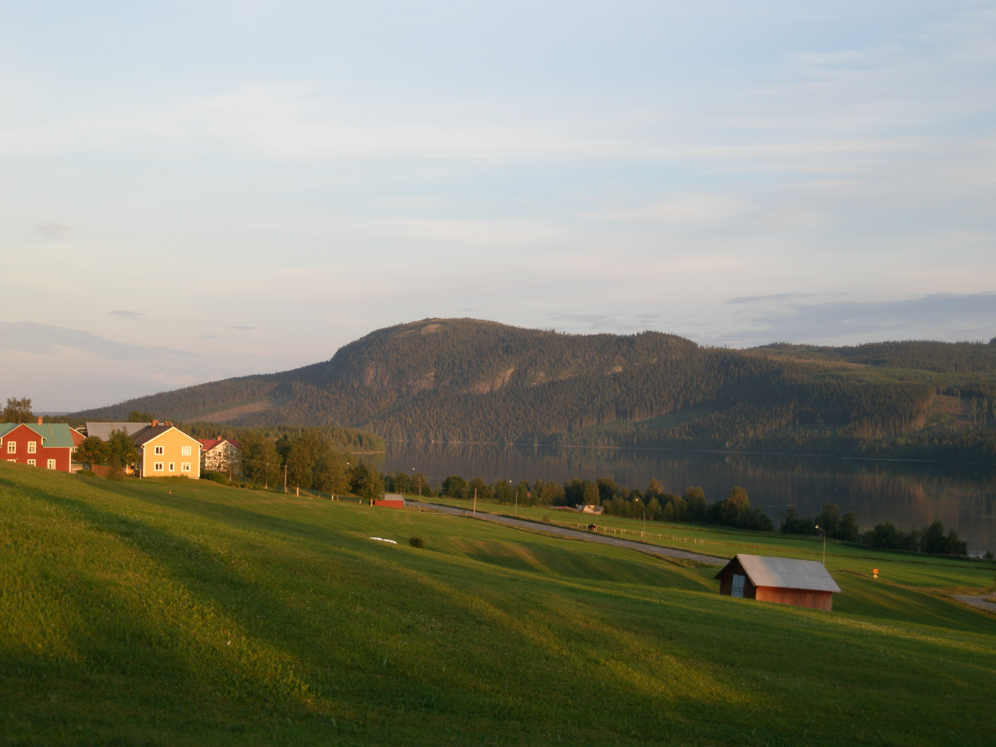 Hällberget, Kaxås, Offerdal, Jämtlands län, Sverige